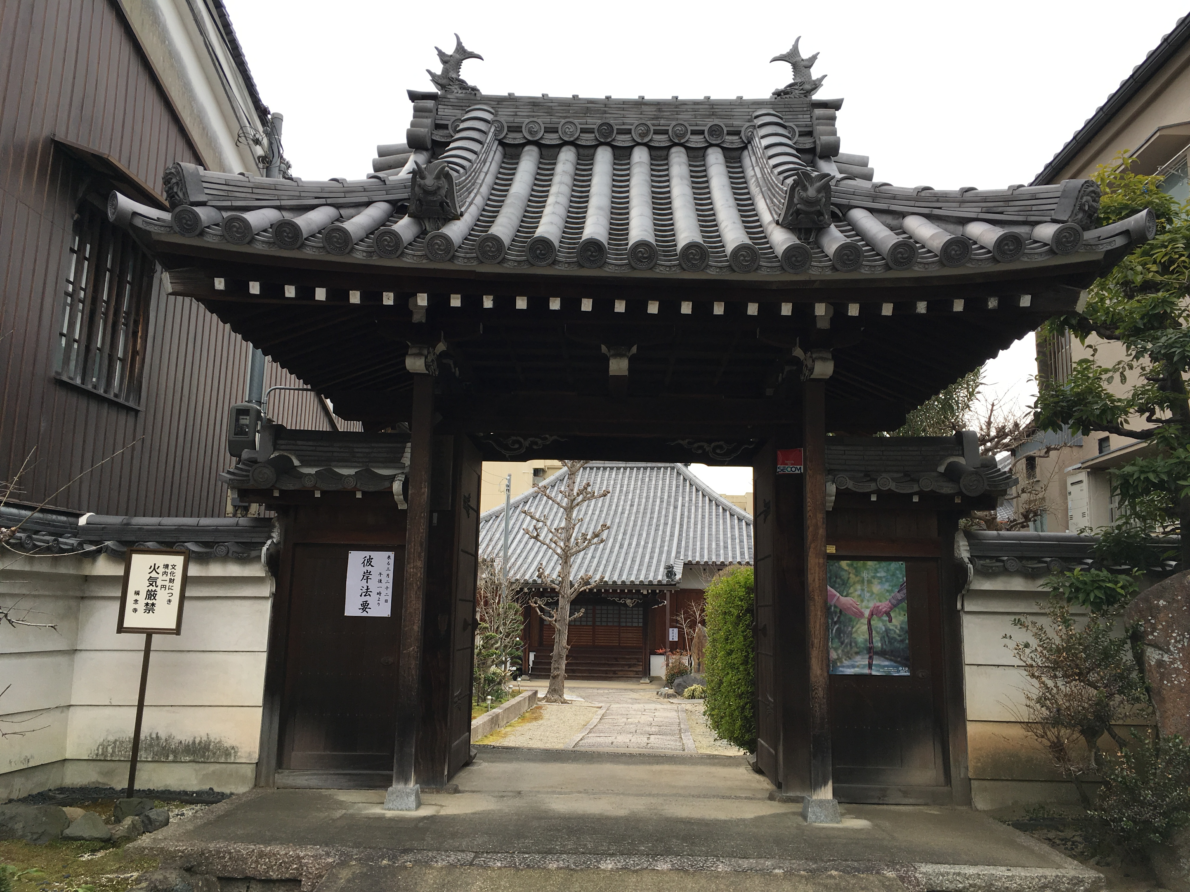 奈良市東木辻町称念寺 山門